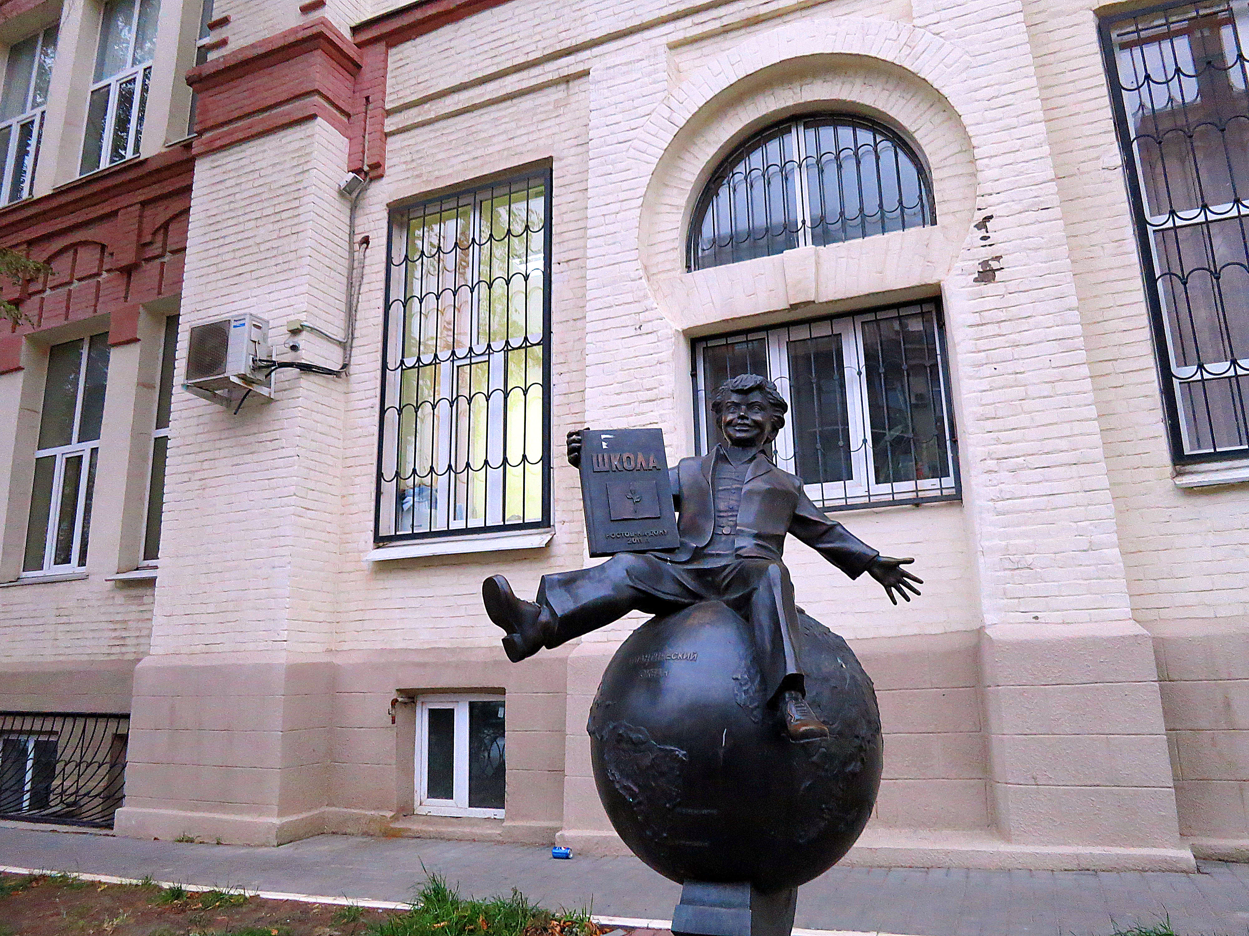 Здание частной гимназии степанова (Ростовская область, Ростов-на-Дону, м. горького улица, 115)